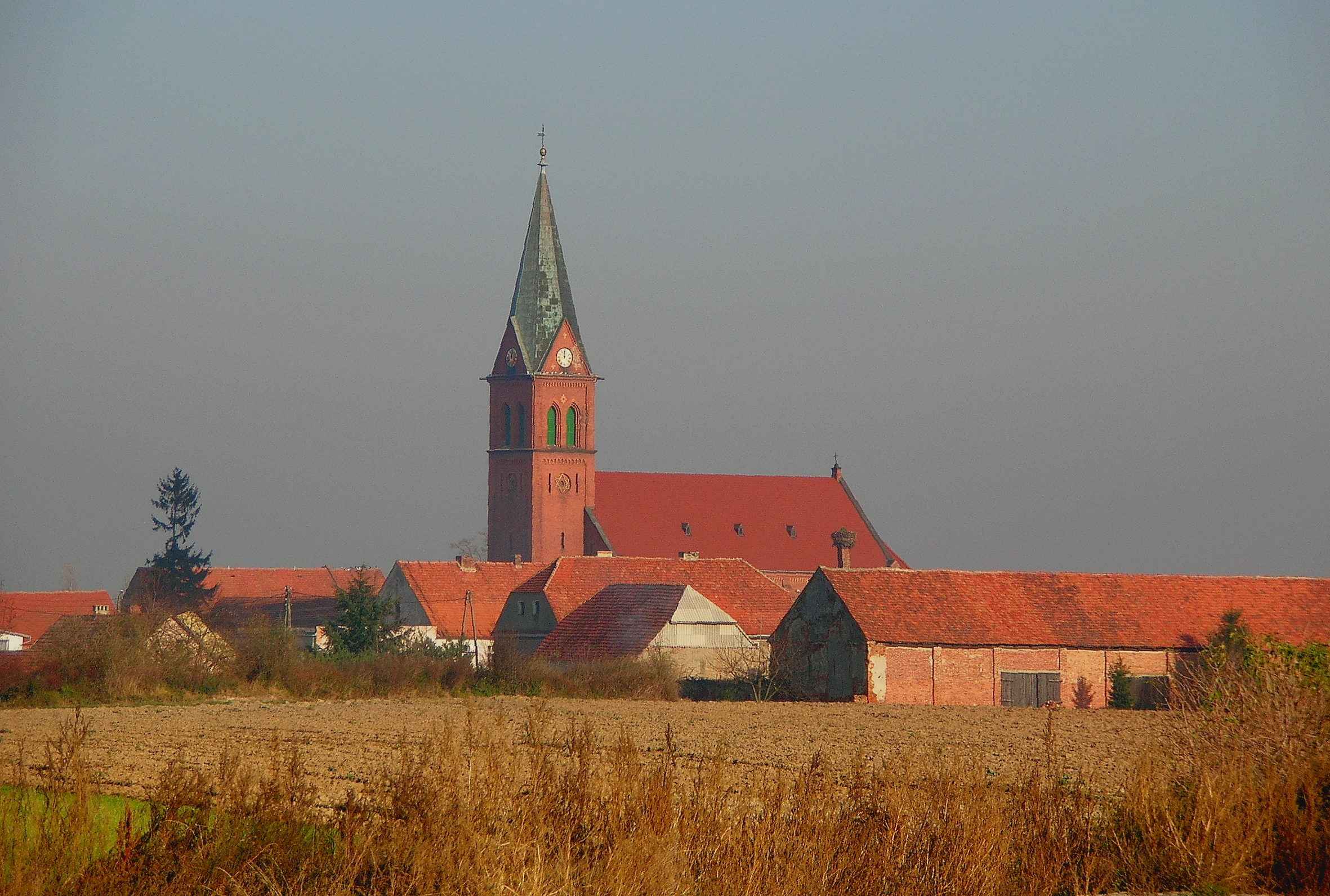 Kościół w Osieku k. Kostomłotów.